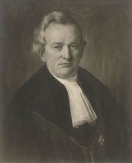 Franz von Kober (1821-1897), Theologe, Priester und Professor für Katholische Theologie an der Universität Tübingen (PND-ID 116263806). Fotografie eines Gemäldes von Roland Risse, 1878, Professorengalerie Universität Tübingen.